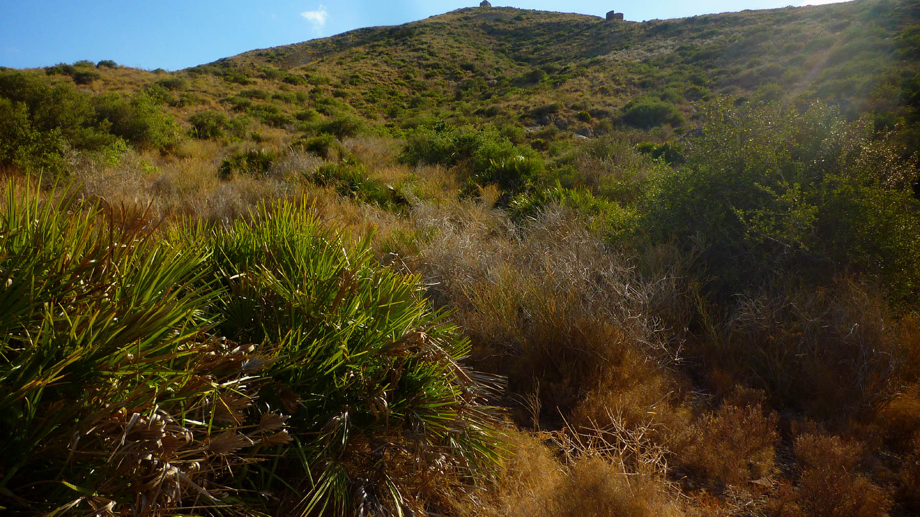 Cabezo de San Ginés, espacio protegido en el entorno del Mar Menor, Cartagena (España). En primer término un ejemplar de palmito (Chamaerops humilis).